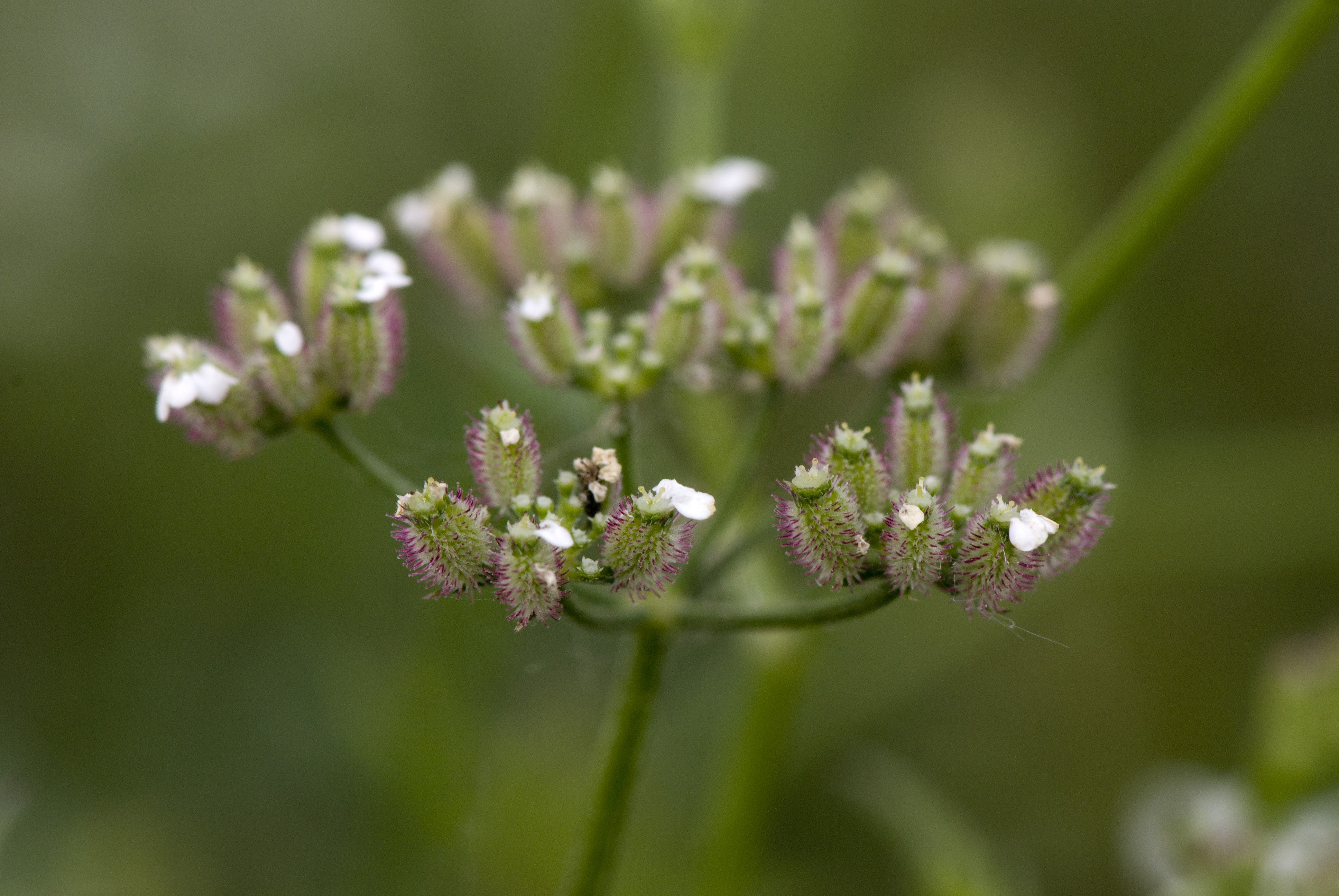 Torilis japonica Vallée-de-Grâce à Amiens (Somme), France